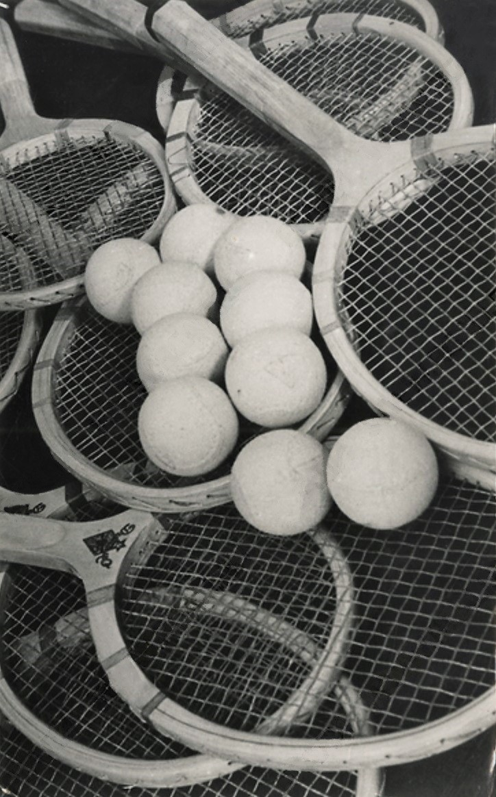 Инвентарь для большого тенниса. На ракетках виден логотип спортивного общества "Динамо"